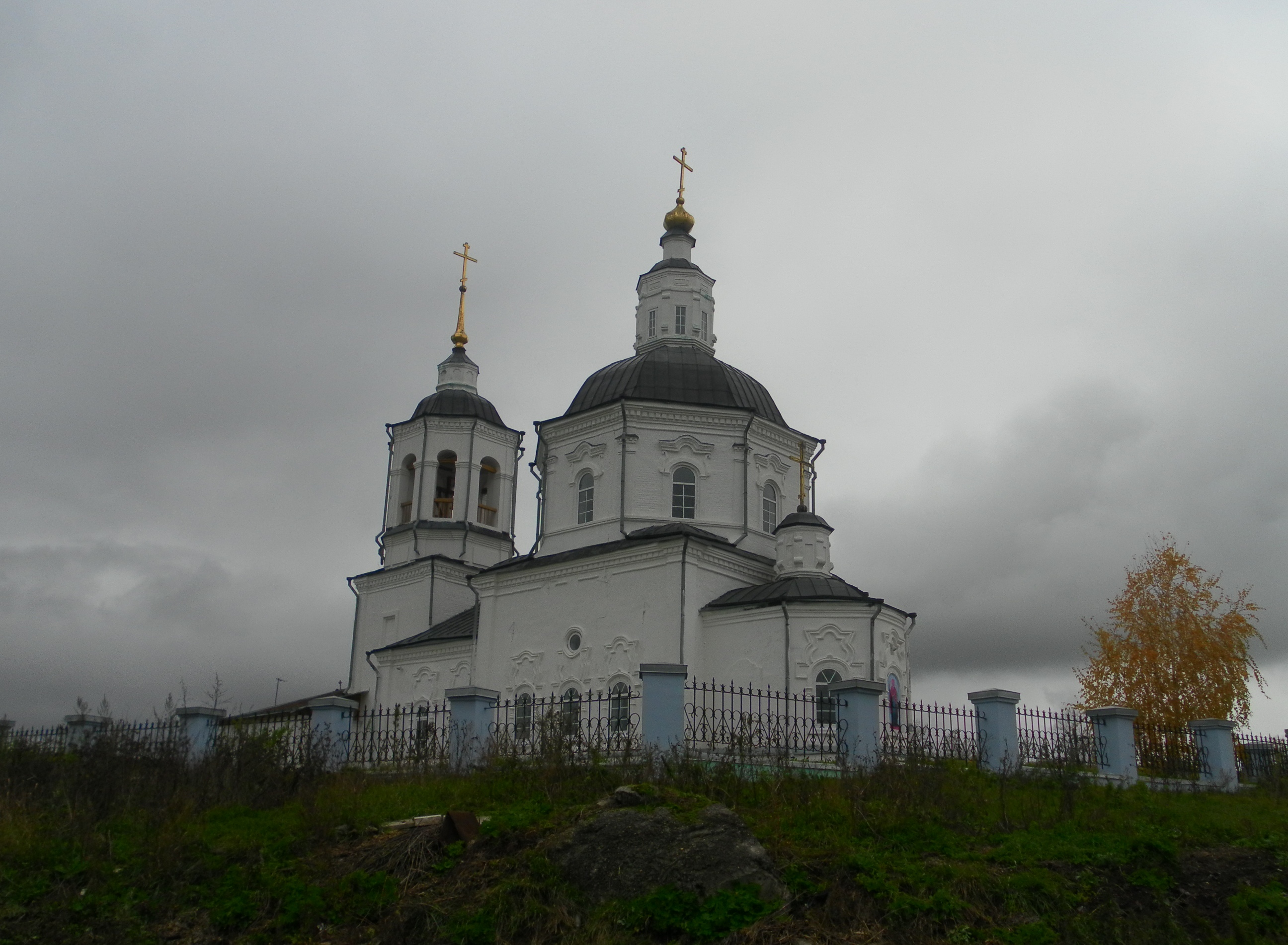 Освящена в 1799 году.